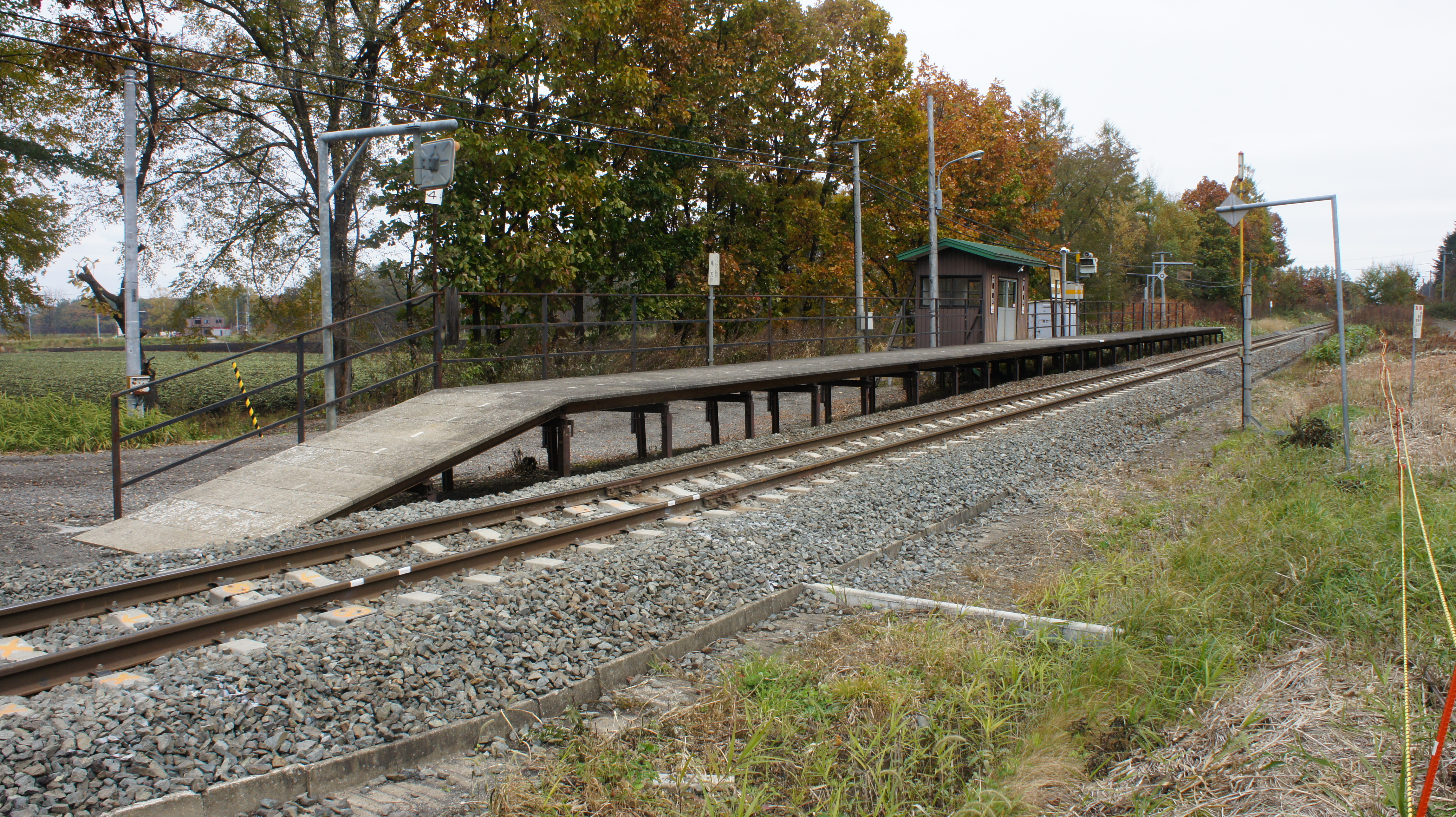 JR根室本線・羽帯駅全景 Sony NEX-3